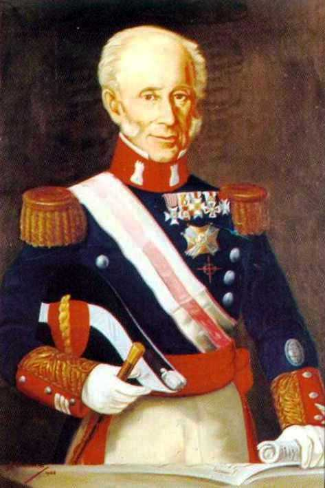 D. Luis Mª Balanzat de Orvay y Briones, Capitan Gral. de Andalucía, Senador y Ministro de la Guerra